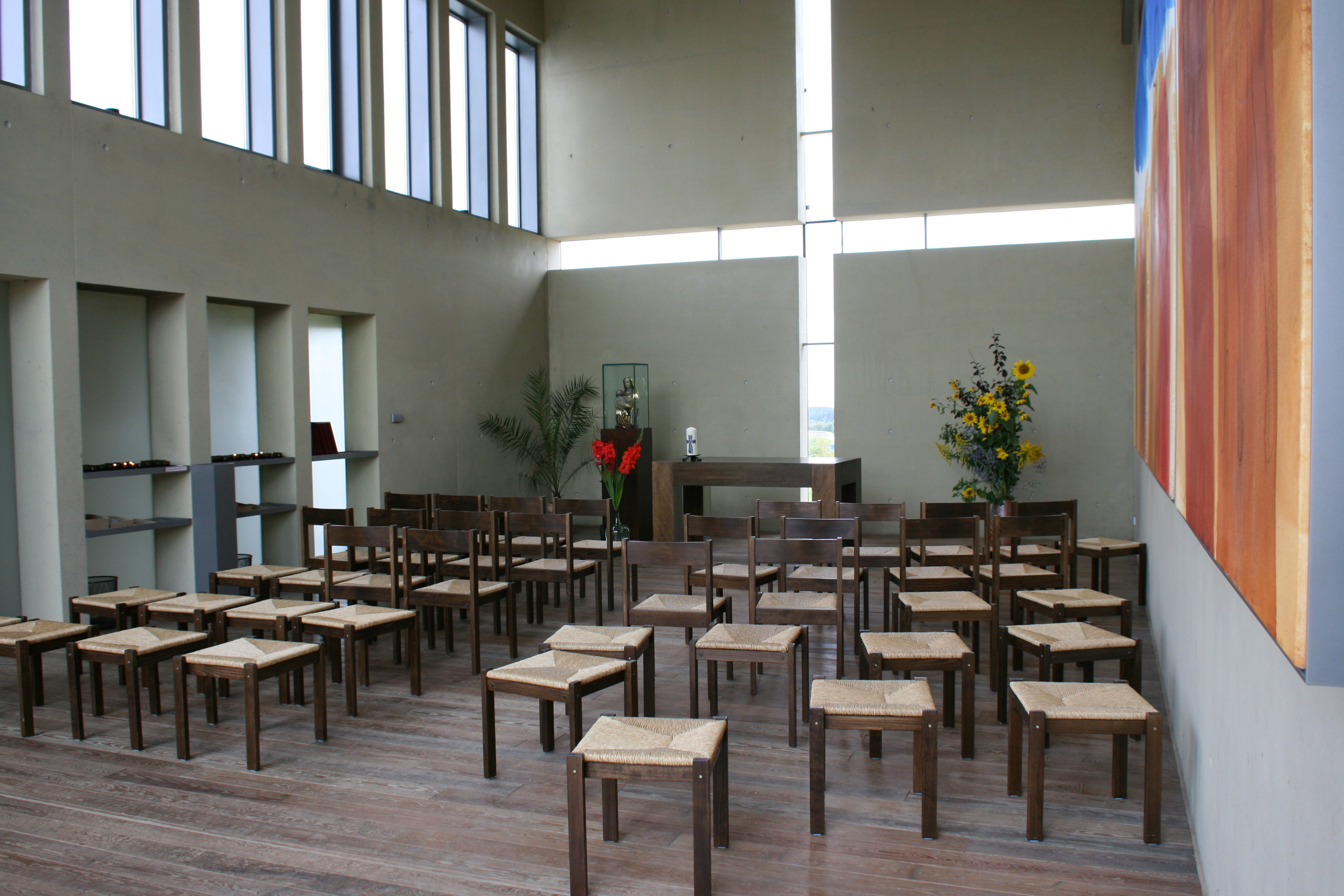 Autobahnkapelle Emmaus an der Raststätte Im Hegau West, BAB 81, Zur Engener Höhe in Engen